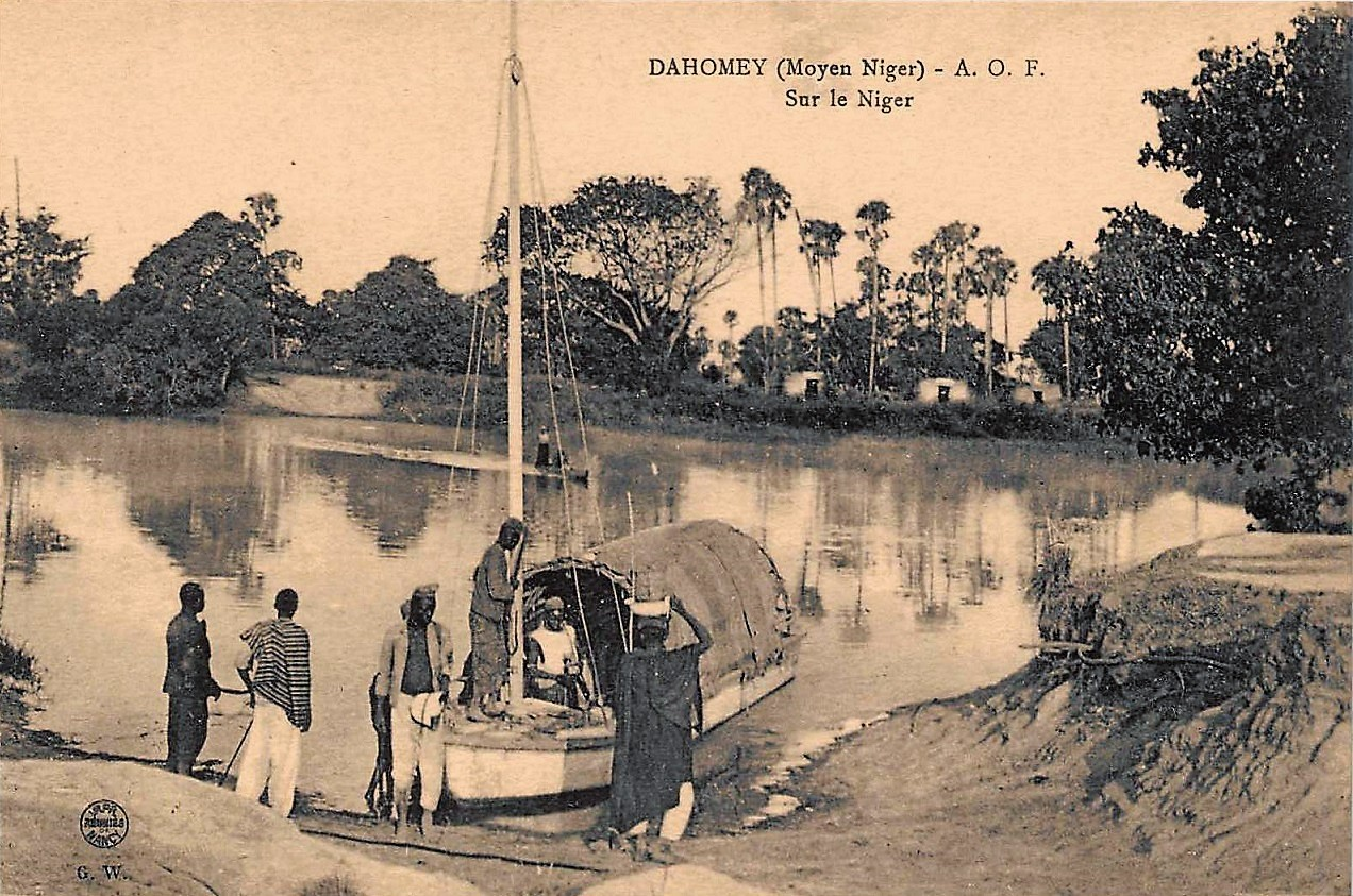 Carte postale - Dahomey (Moyen-Niger) - A. O. F - Sur le Niger